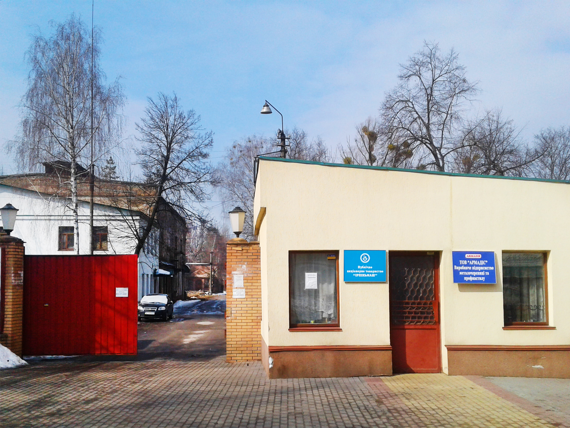 Завод "Ірпіньмаш"